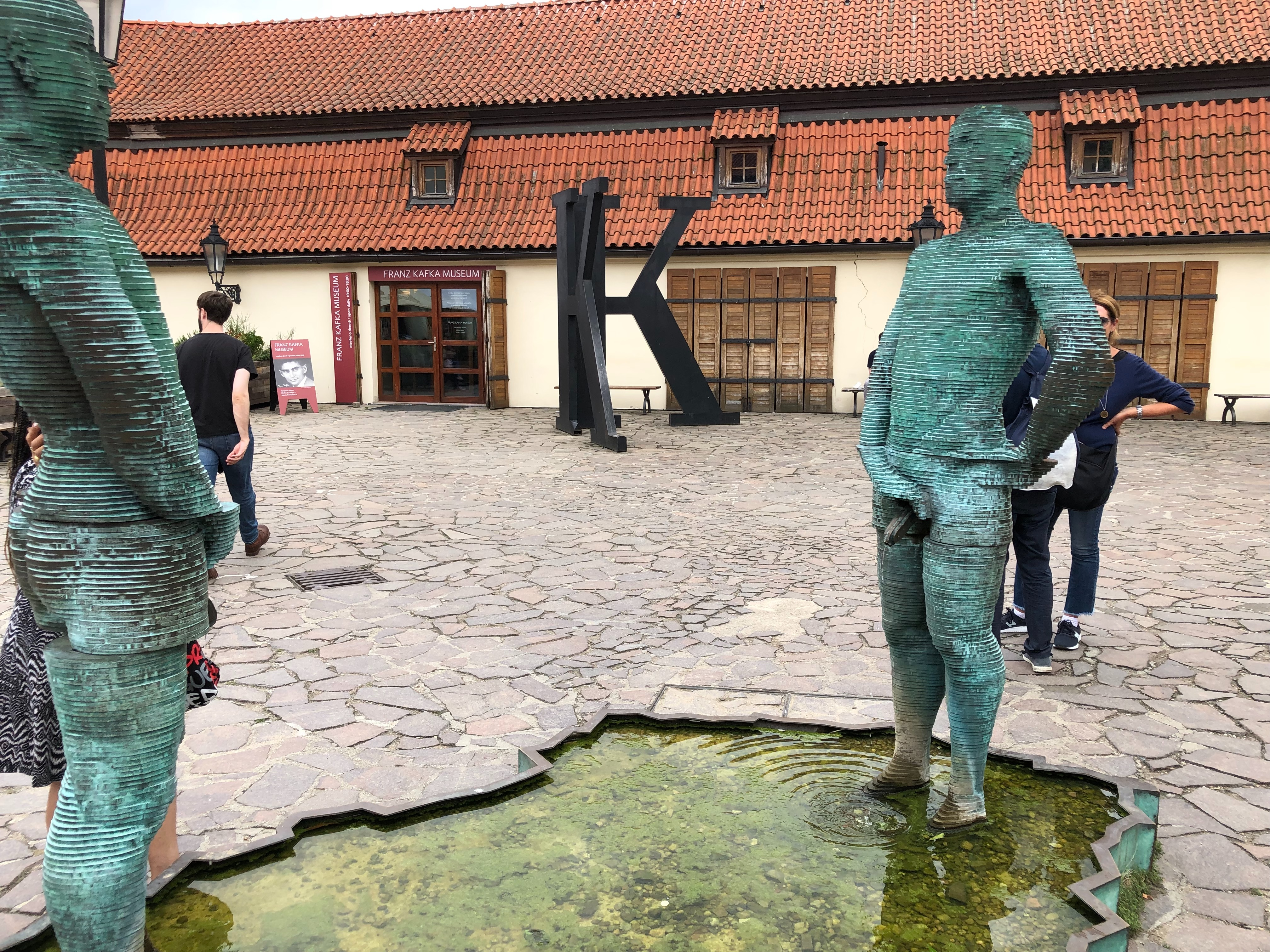 Praag, Tsjechië, August 2019